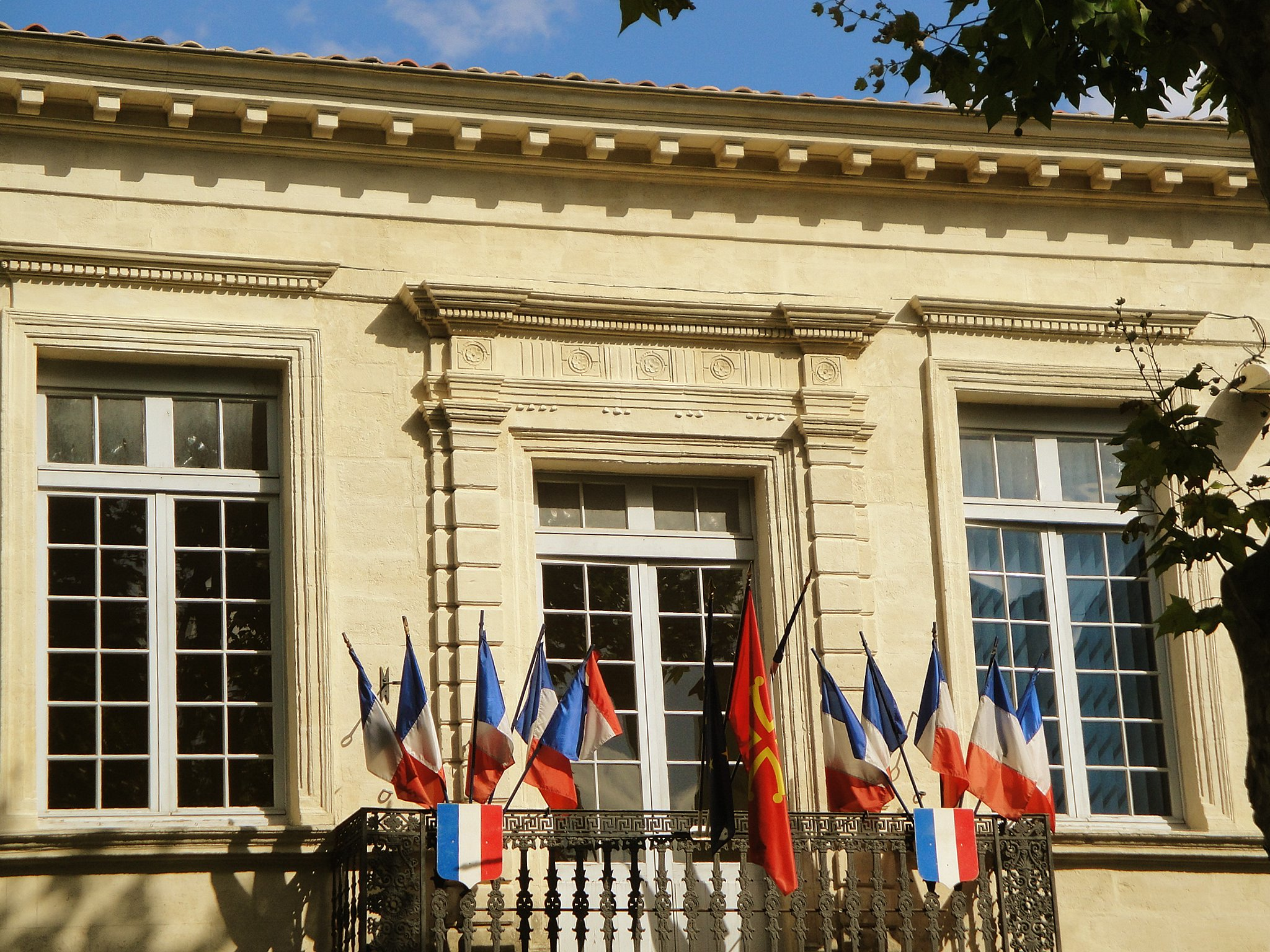 Mairie